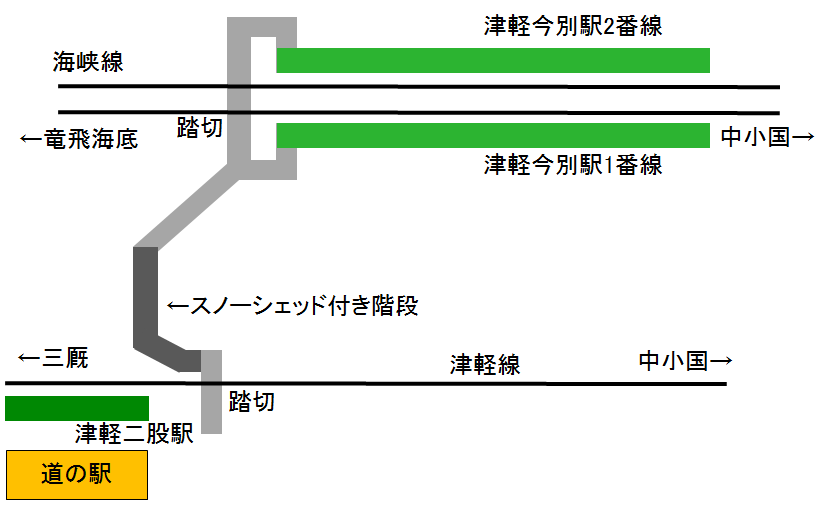 津軽今別駅・津軽二股駅・道の駅いまべつ構内位置図